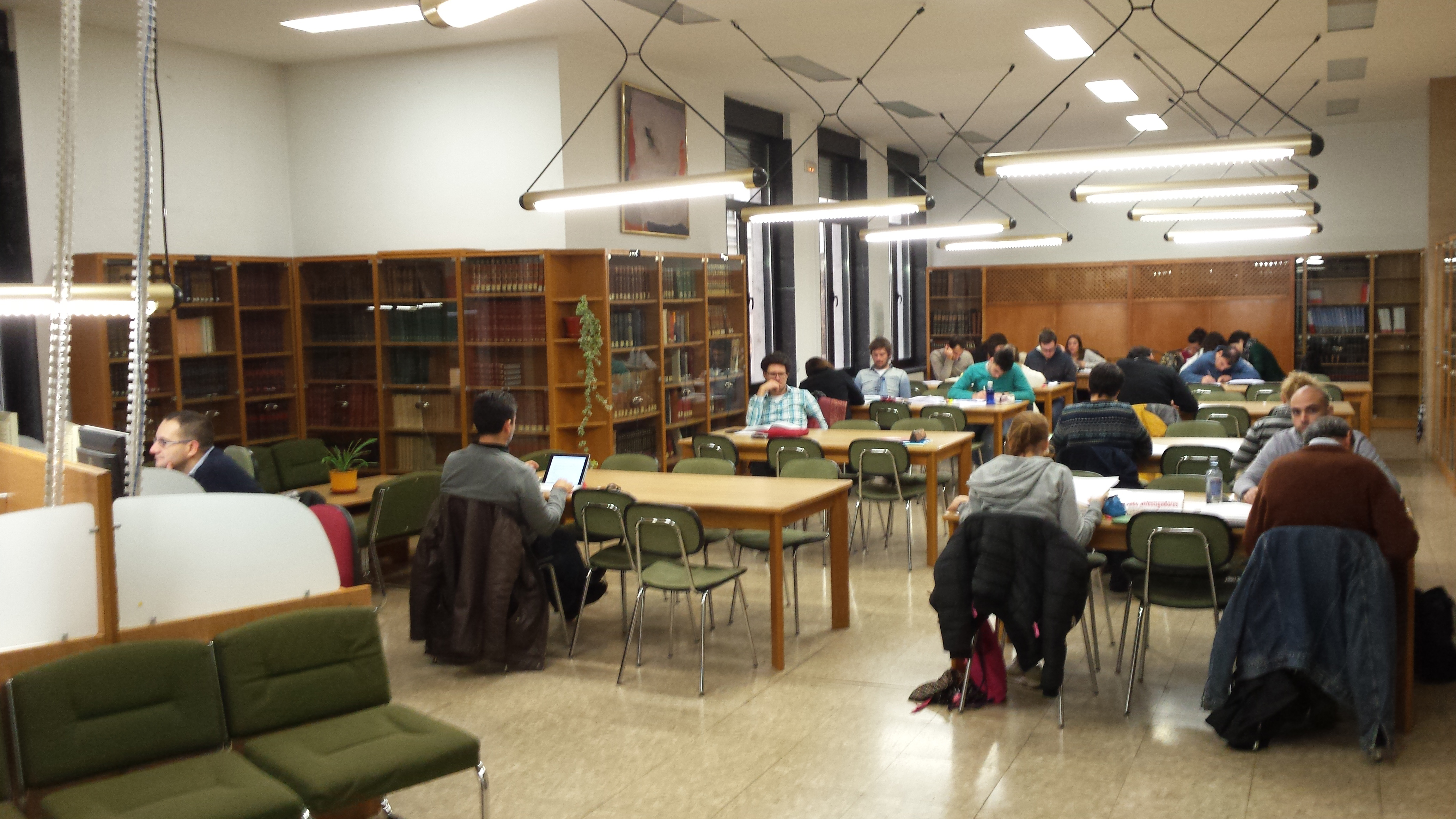 Interior de la sala de lectura de la Biblioteca Regional "Mariano D. Berrueta"